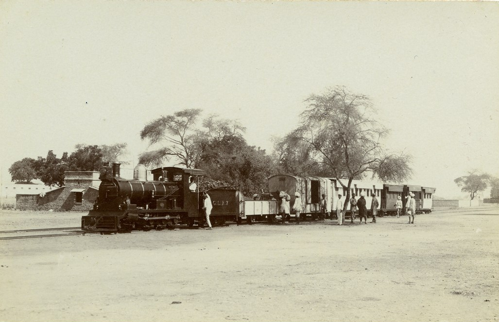 Le Gezira Light Railway à l’arrêt dans une petite gare de la Gezira soudanaise. (Coll H Fontaine)